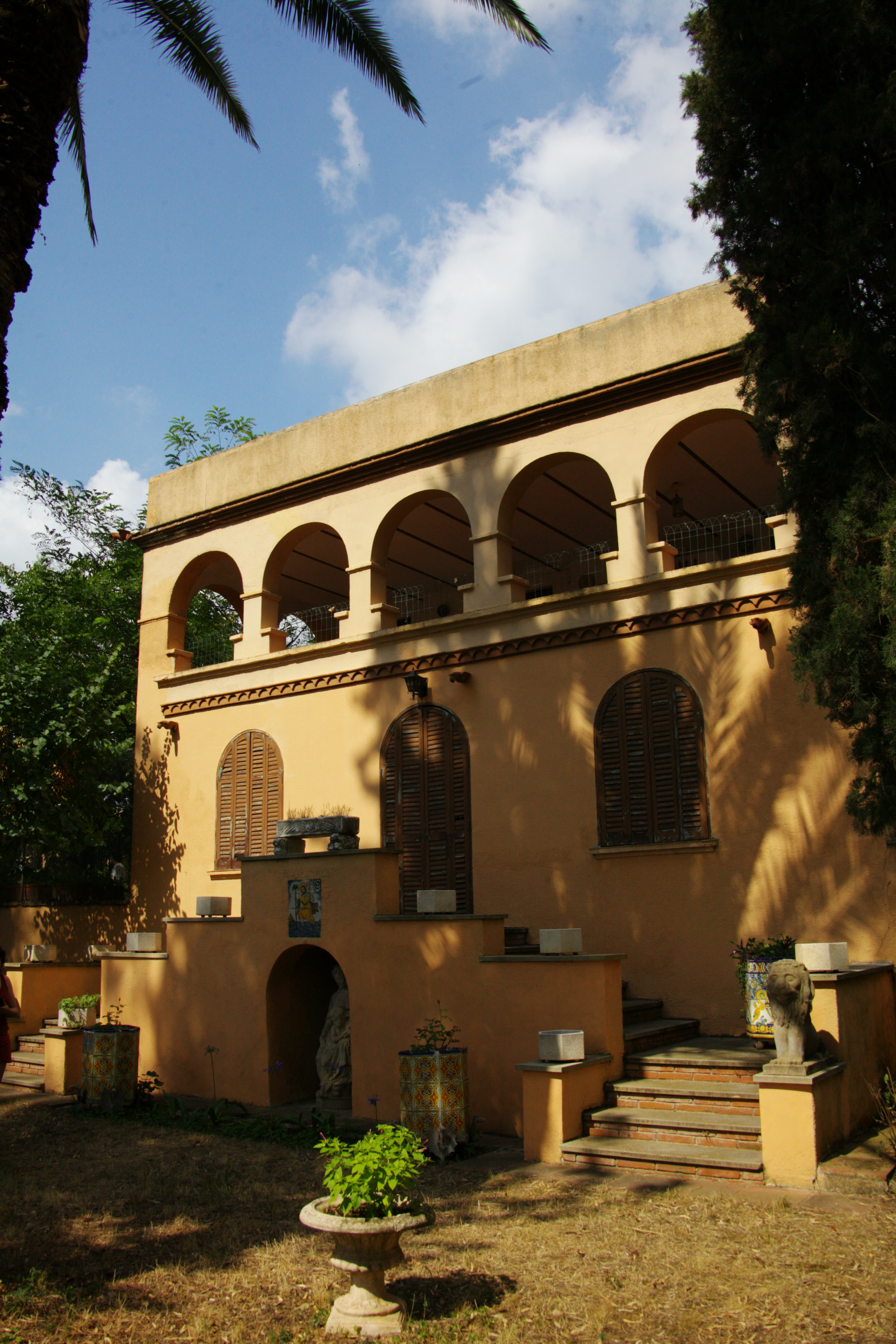 Can Feliu, o Can Sitges, masia on va viure Eugeni Xammar